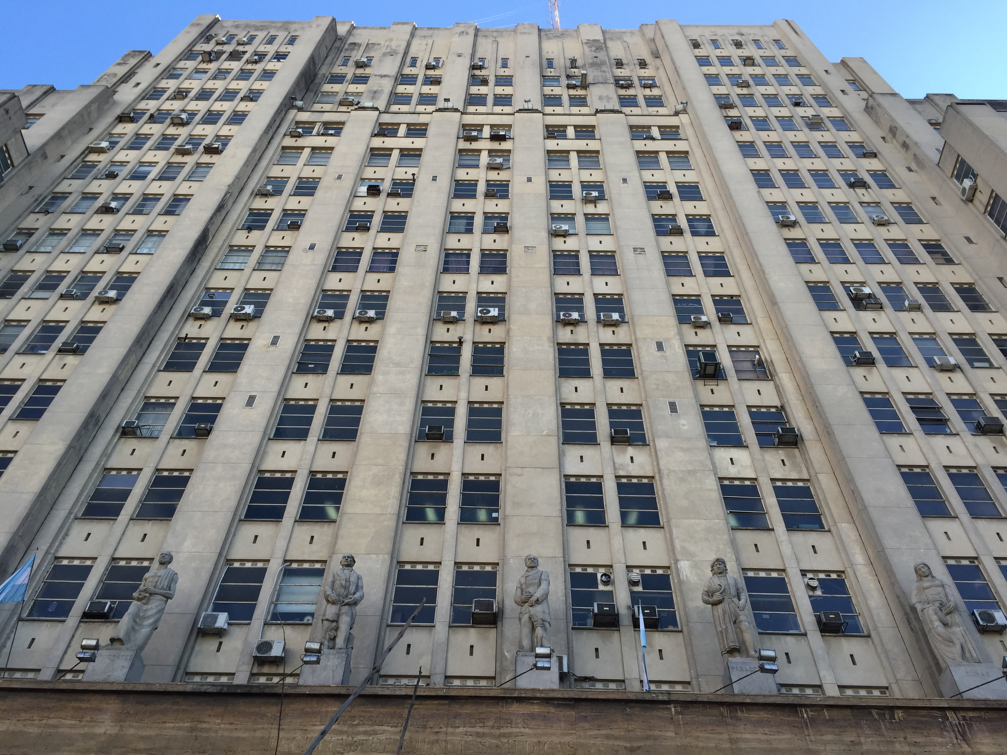 Fachada de la Facultad de Medicina de la Universidad de Buenos Aires